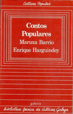 Biblioteca Básica da Cultura Galega, 18, Contos Populares, Maruxa Barrio e Enrique Harguindey.jpg